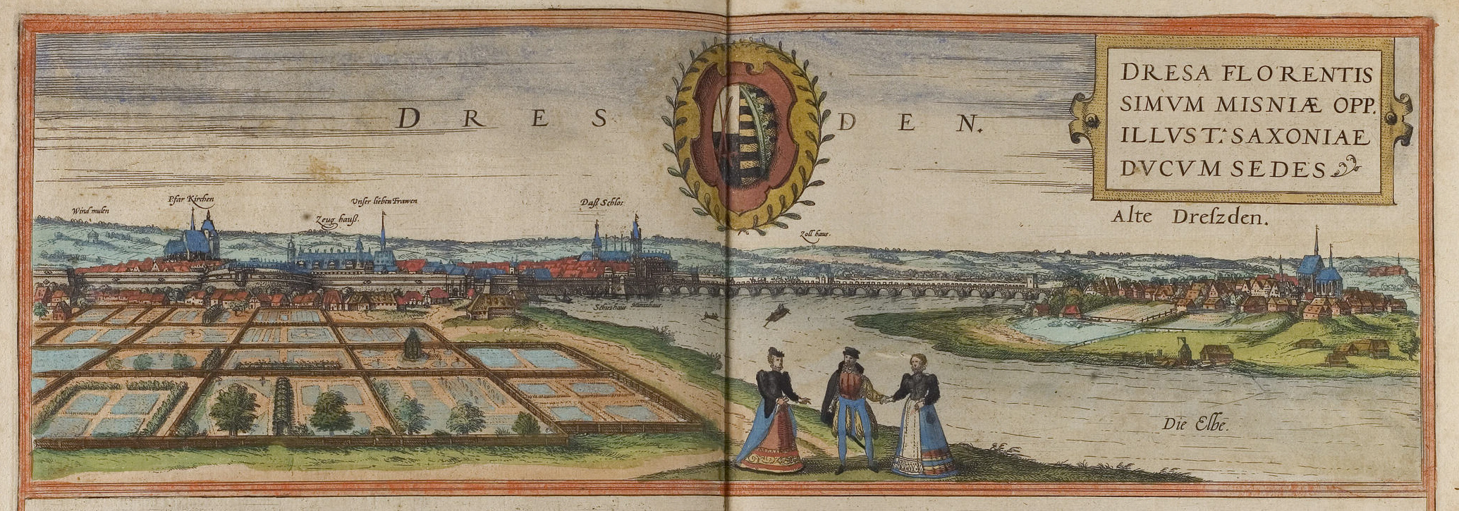 Dresden